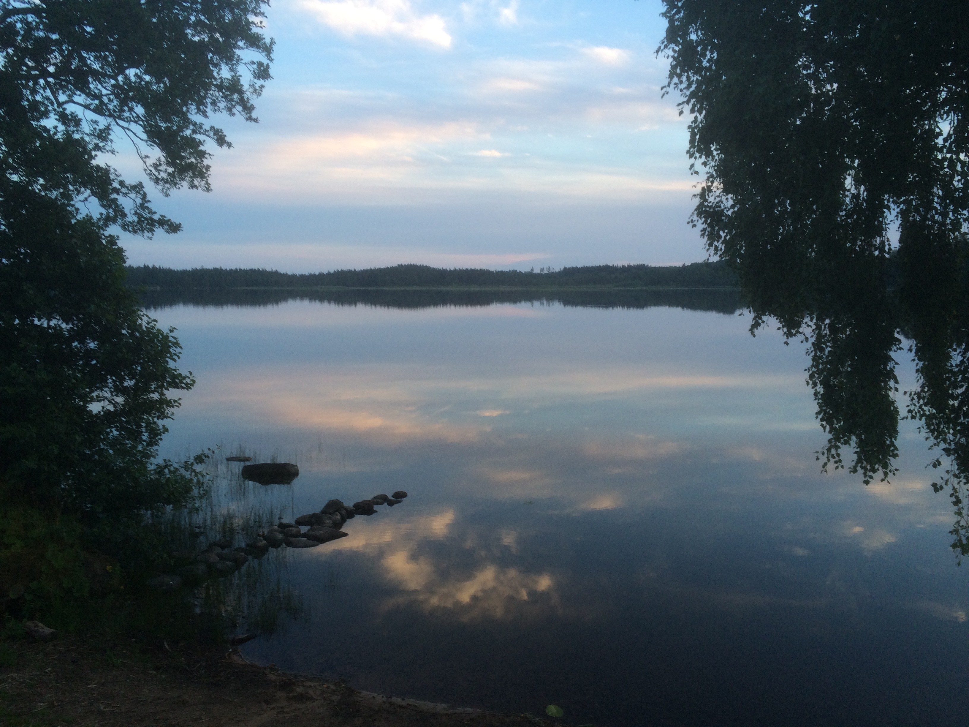 Kvällsvy över Rogbergasjön i Jönköpings kommun